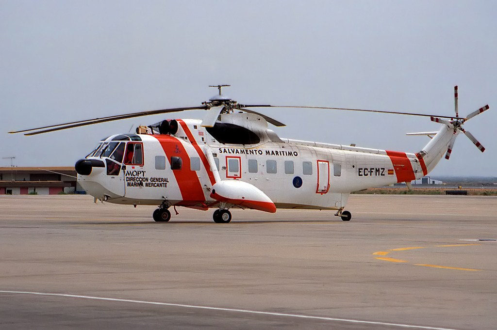 EC-FMZ » 61361